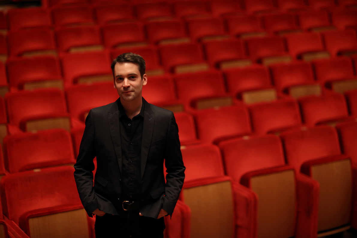 Porträt